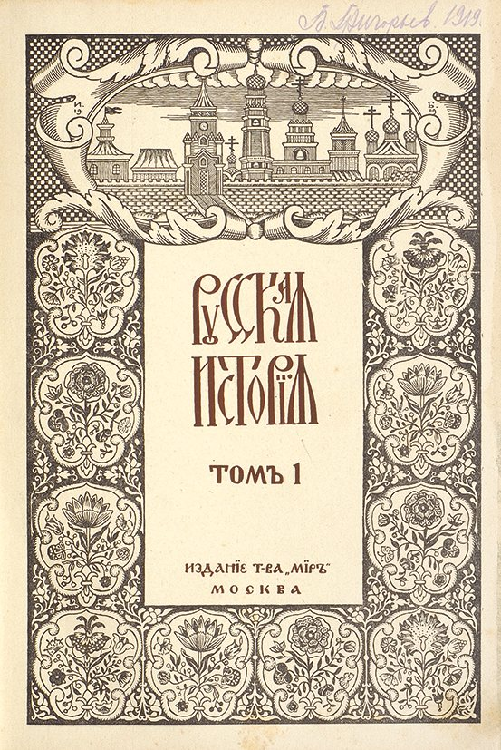 Покровский, М.Н. Русская история с древнейших времен / М.Н. Покровского, при участии Н.М. Никольского и В.Н. Сторожева. 2-е изд. В 5 т. Т. 1-5. М.: Издание Т-ва «Мир», 1913. Т. 1: 259, 56, 7 с., ил., 24 л. ил. Т. 2: 306, 49 с., ил., 17 л. ил. Т. 3: [4], 234, 72 с., ил., 27 л. ил. Т. 4: [4], 337 с., 27 л. ил.: ил. Т. 5: [4], 349 с., 20 л. ил. 26,3 х 18,5 см.